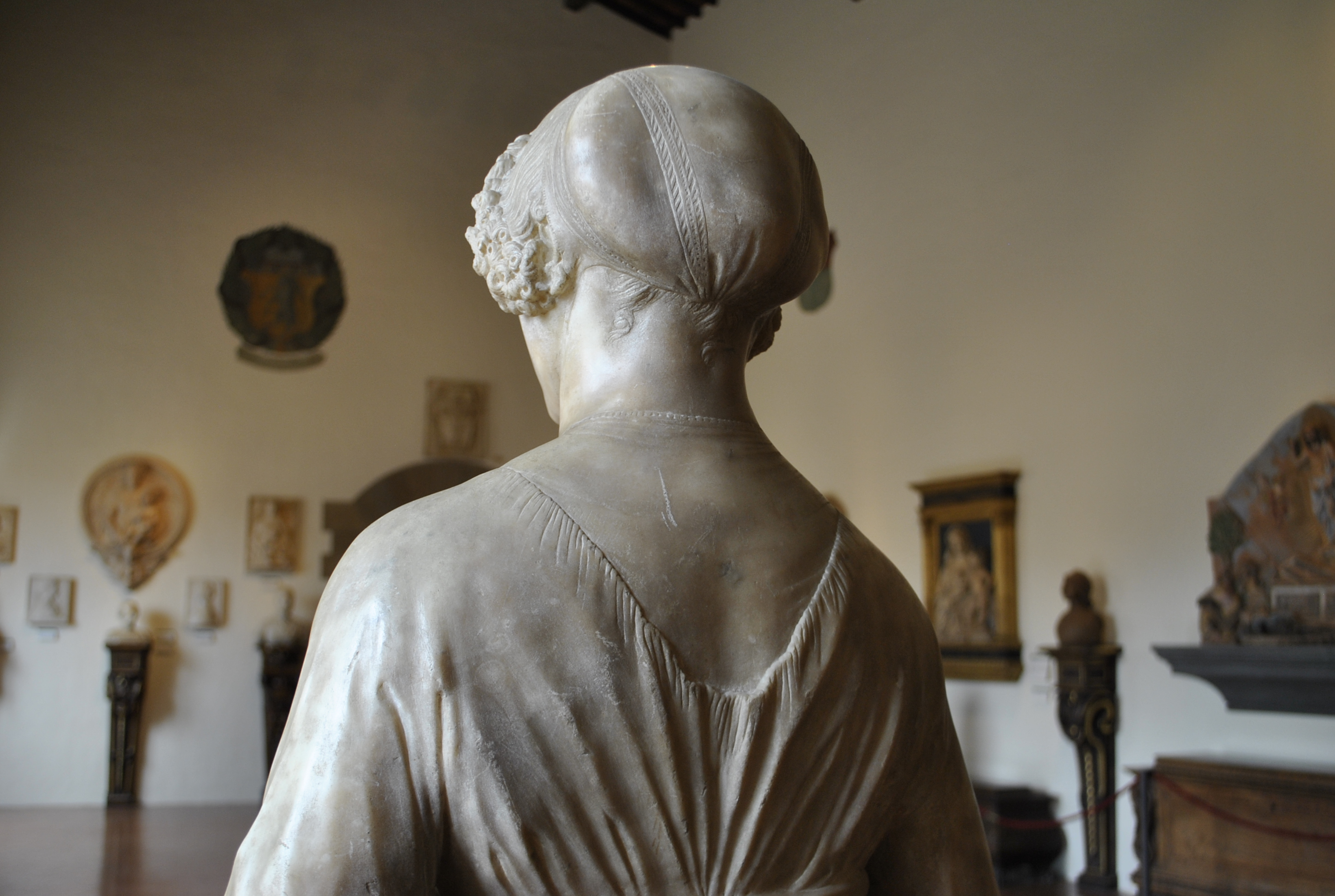 (1476-1478) museo nazionale del Bargello, Firenze